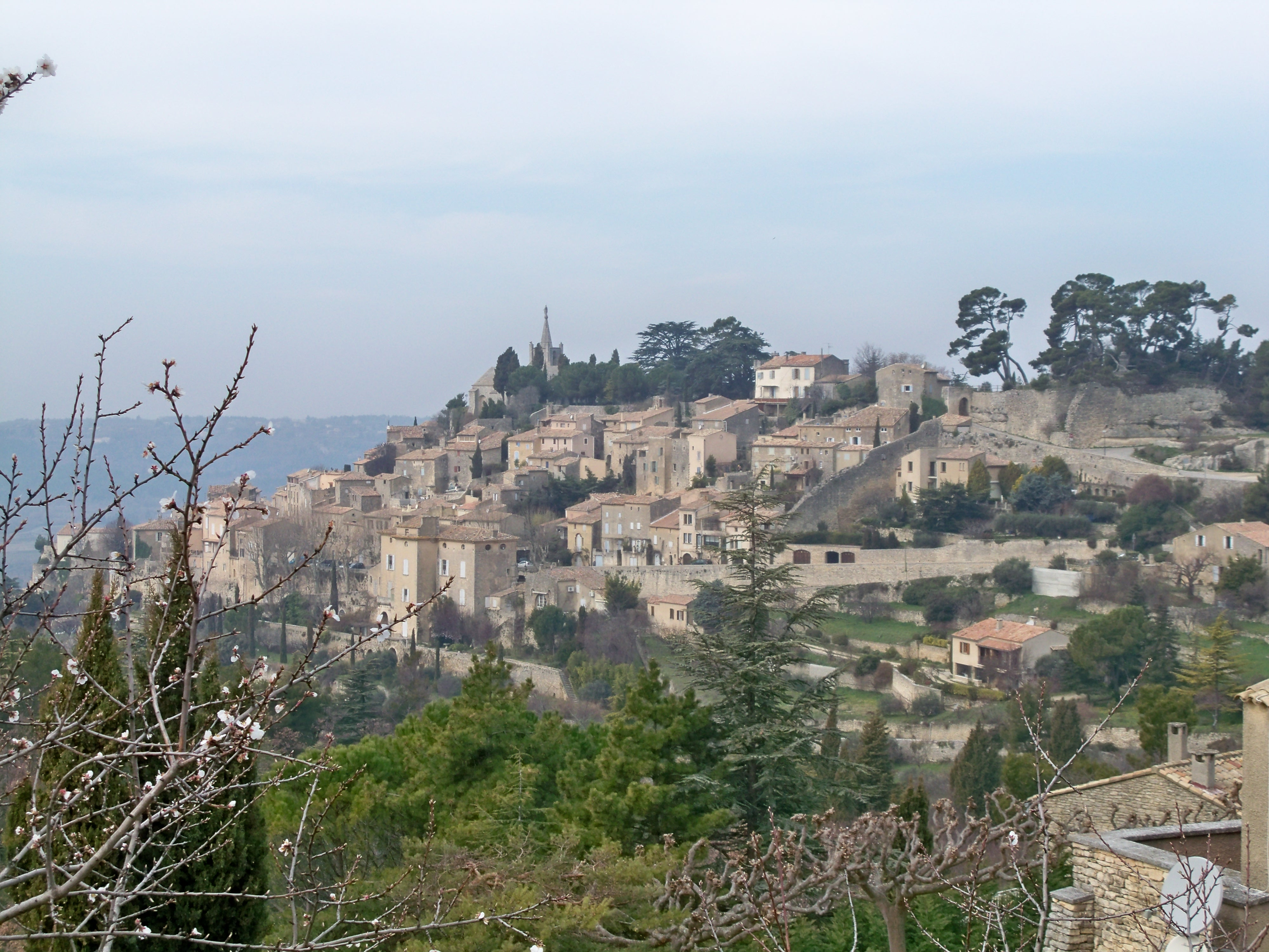 vue sur le village de Bonnieux, Vaucluse, France